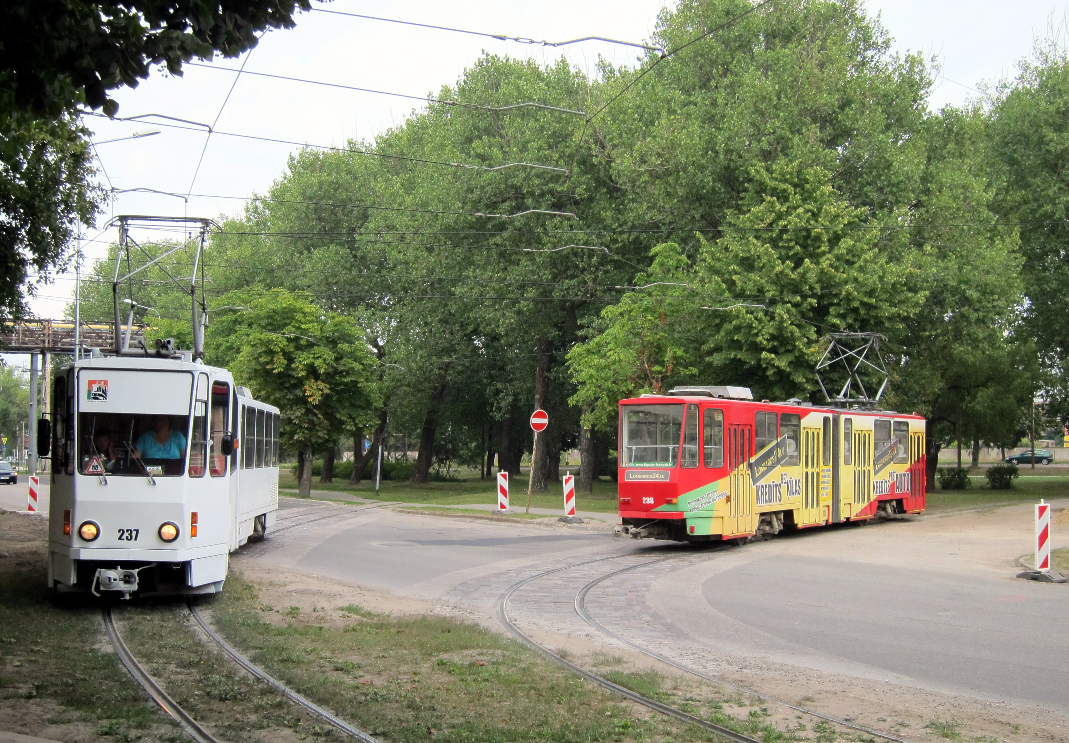 Tramvaji Liepājā, Brīvības ielas galapunktā